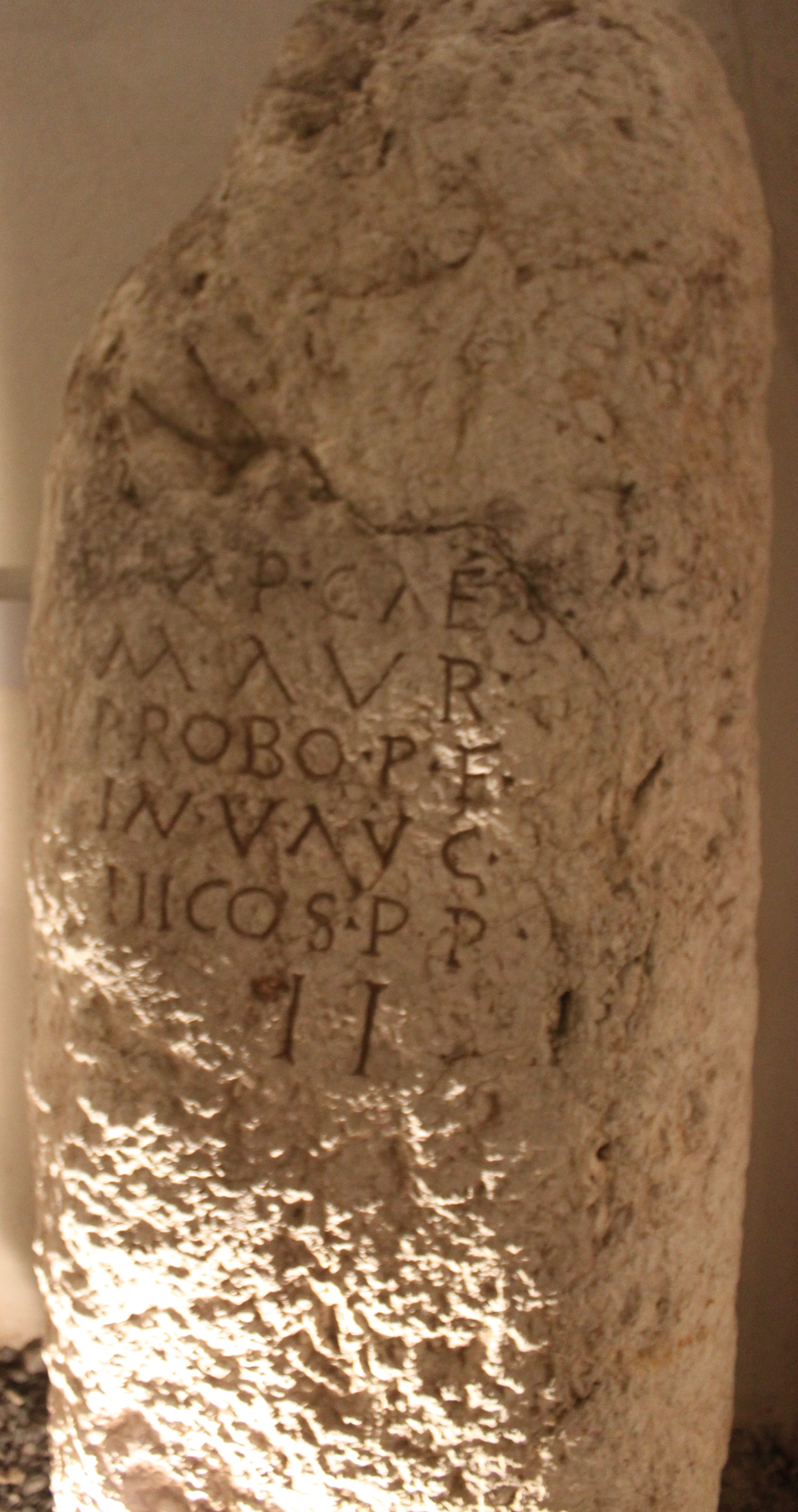 Inscription latine d'époque romaine retrouvée au lieu dit l'Escourcho, hameau de Sionne, commune de Castellane, à proximité du col de Lèques et conservé au musée de Digne depuis 1882. Borne milliaire de l'empereur Probus. Texte latin : "Imp(eratori) Caes(ari) / M(arco) Aur(elio) / Probo P(io) F(elici) / Inu(icto) Aug(usto) / III co(n)s(uli) p(atri) p(atriae) / II." références : CIL, XII, 5437 ; CIL, XVII(2), 14 ; G. Bérard, CAG 04, Paris, 1997, p. 123 n°27*